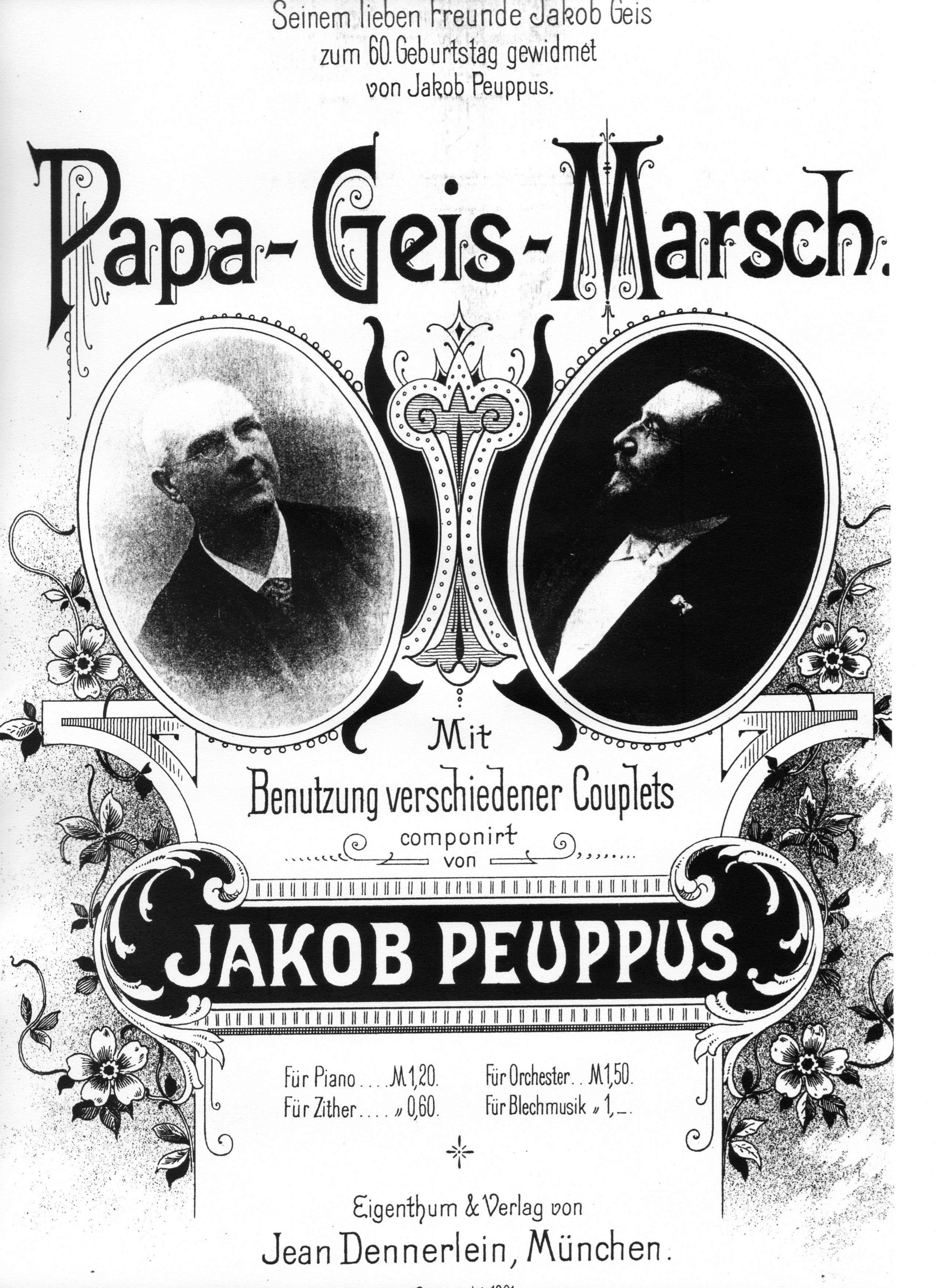 Jakob Peuppus: Eine Komposition an seinen Freund Jakob Geis zum 60 Geburtstag